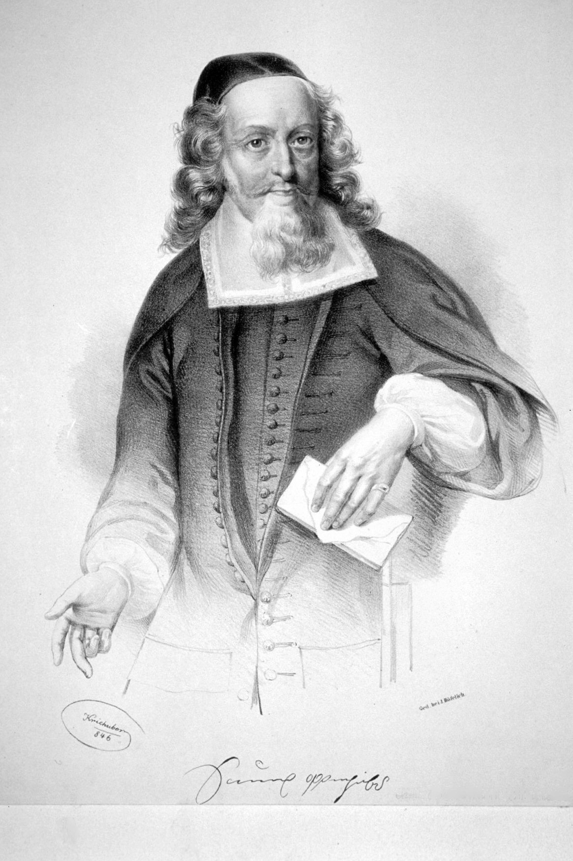 Samuel Oppenheimer, Lithographie von Josef Kriehuber, 1846, Reproduktion eines zeitgenössischen Kupferstichs